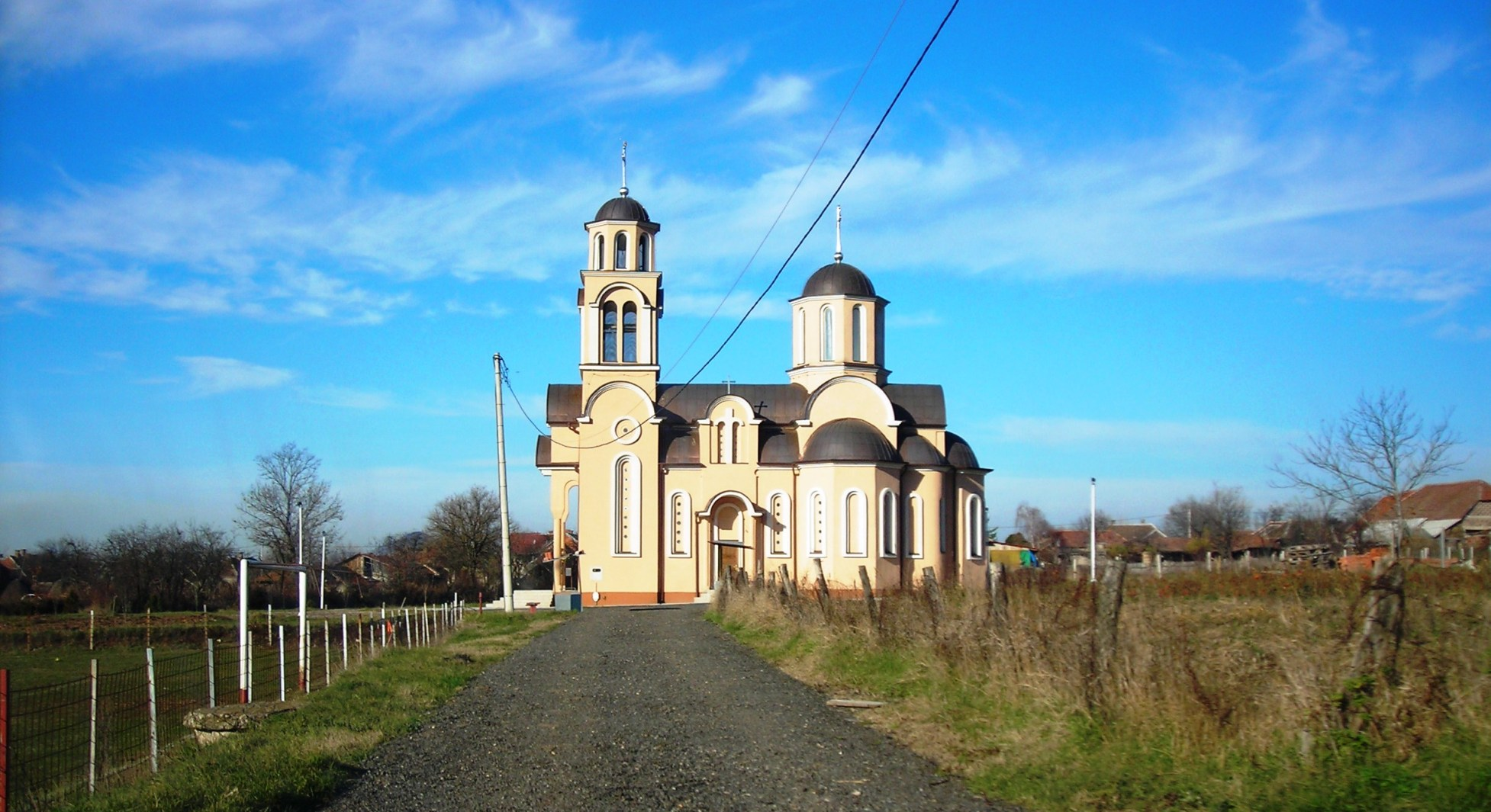 Црква у Витошевцу - Church in Vitoševac